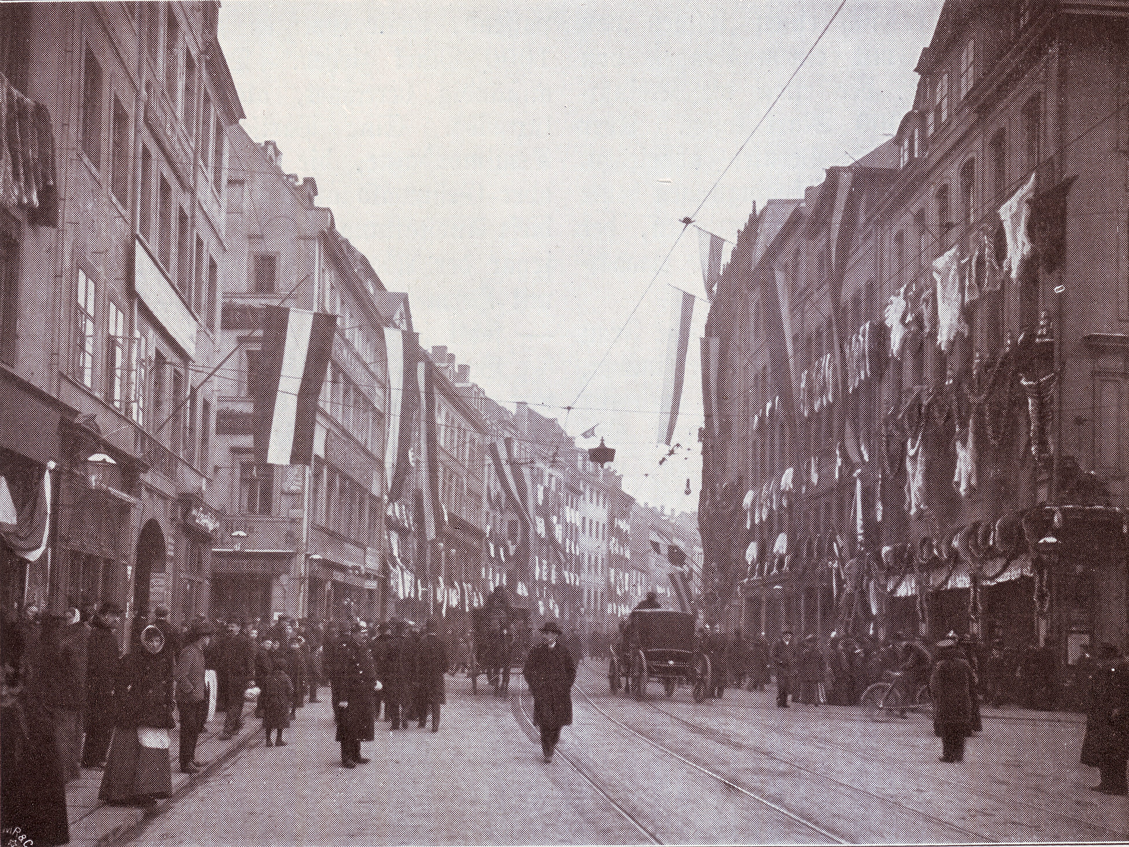 Der Leipziger Bruehl, das europäische Pelzzentrum neben London, vor 1906.